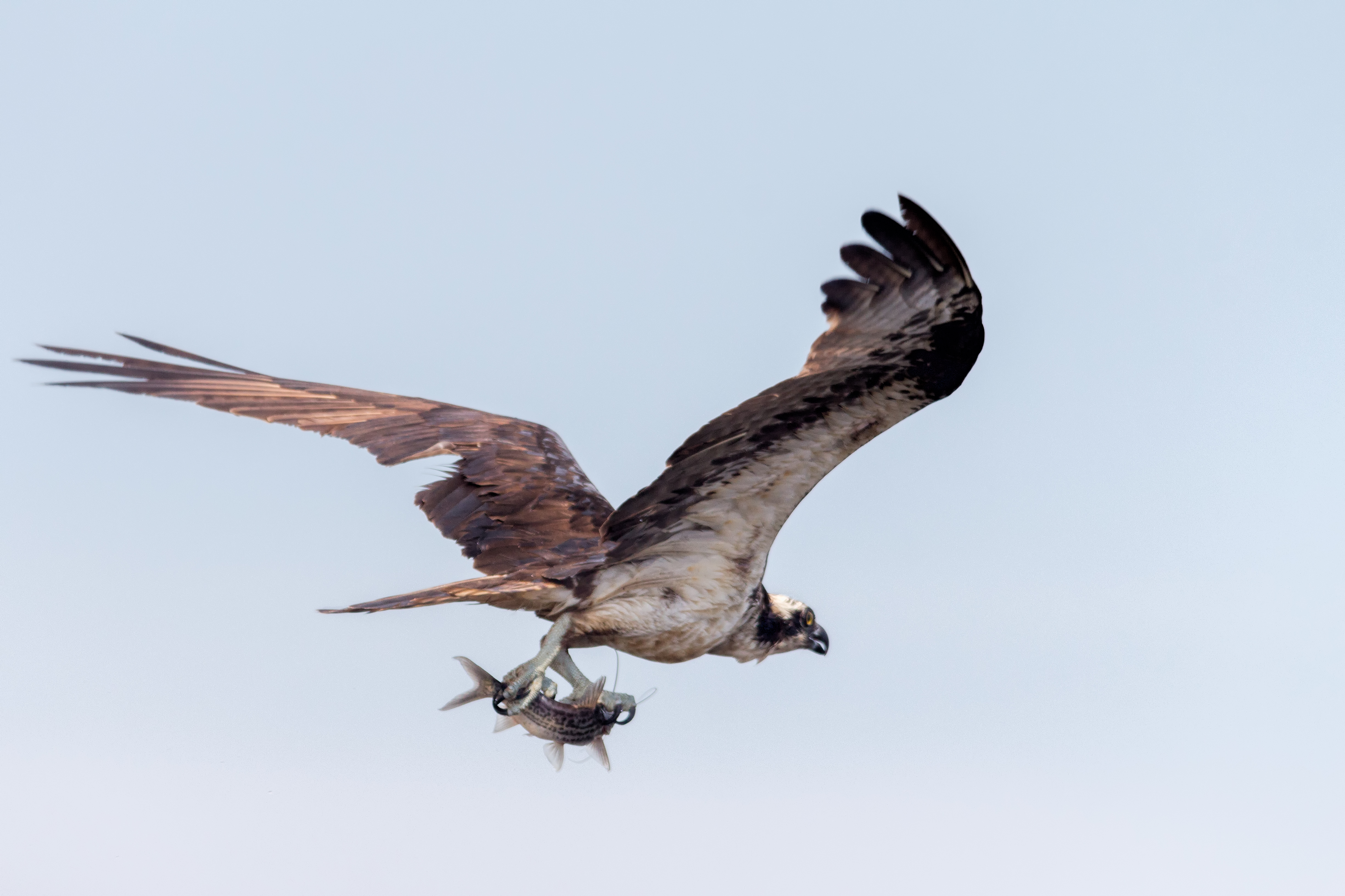 Osprey | Águila pescadora (Pandion haliaetus carolinensis)